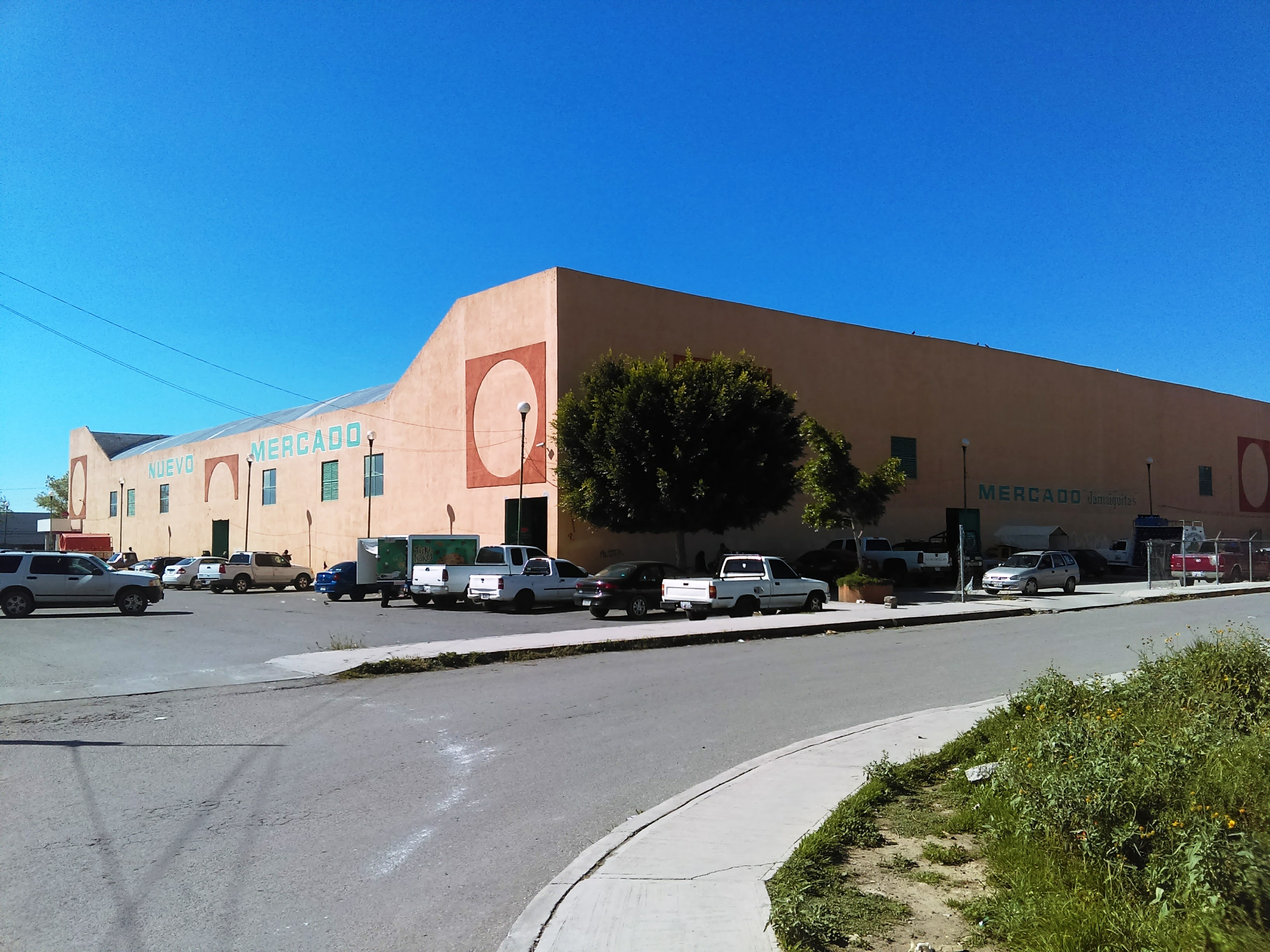 Mercado Jamaiquitas en Actopan, Hidalgo